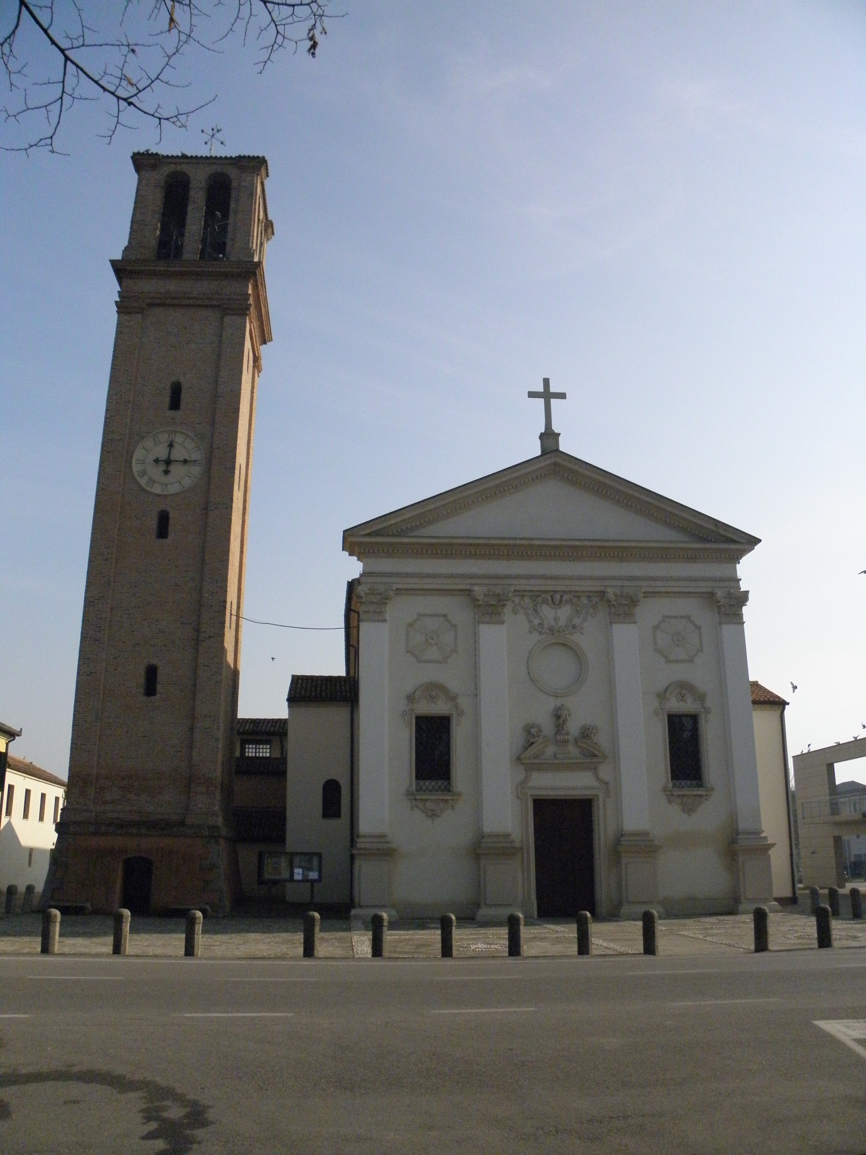 Vescovana, provincia di Padova: chiesa parrocchiale dedicata a San Giovanni Battista.